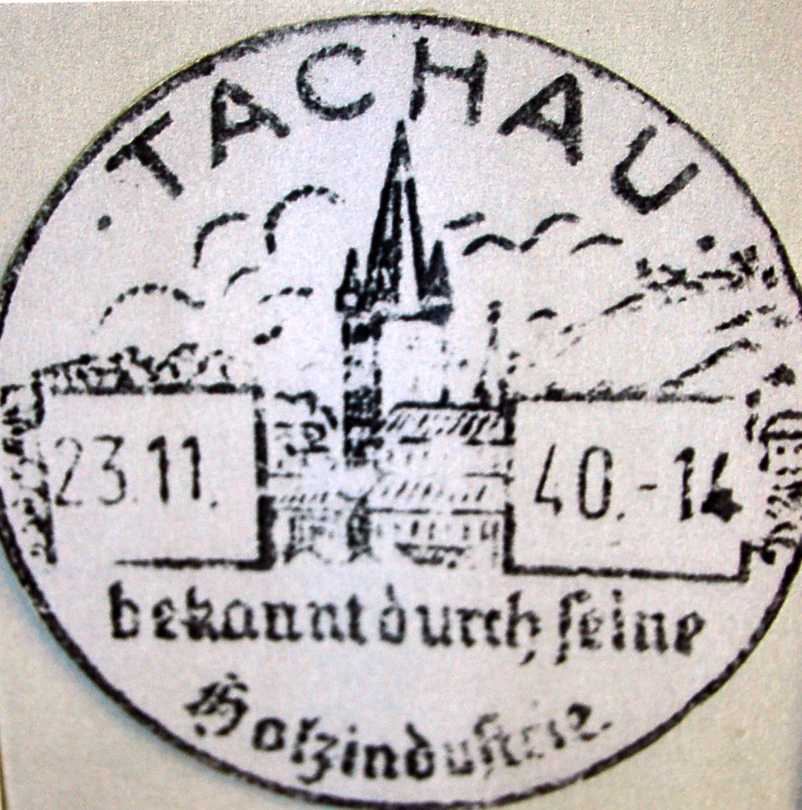 Poststempel-Tachau in 1940 (Sudeten)